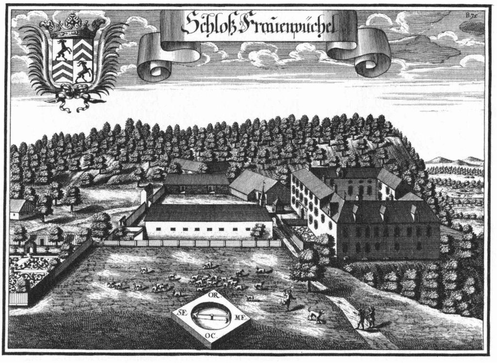 Schloss Frauenbühl nach der Historica-topographica descriptio des Michael Wening von (1721)